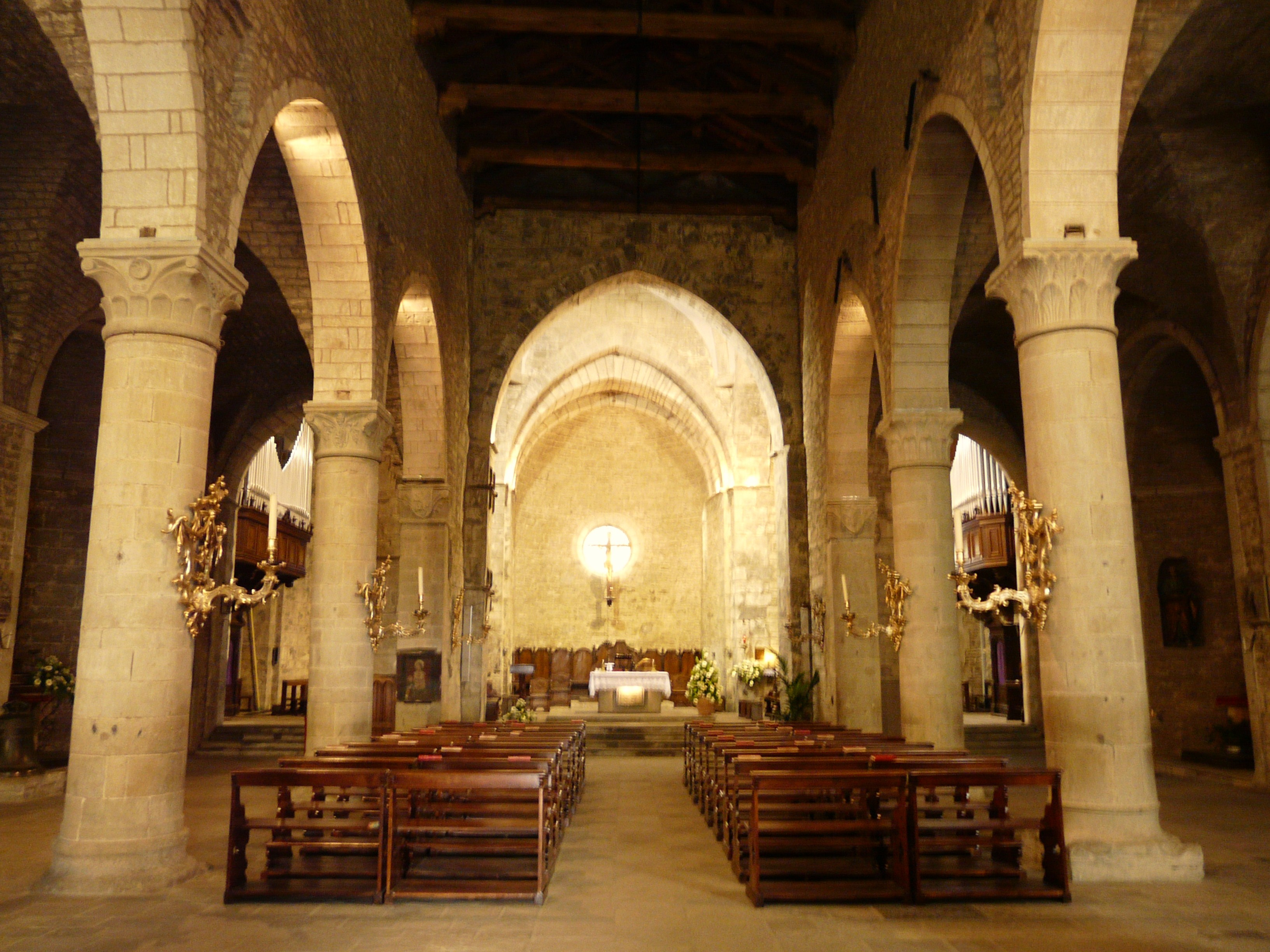 Duomo di Berceto, Emilia Romagna, Italia